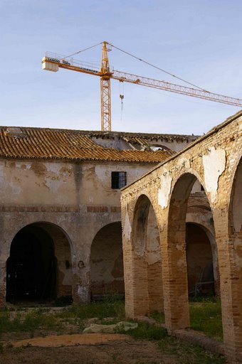 Agujero en el tejado de los almacenes traseros de la Casa de Arizón en Sanlúcar de Barrameda